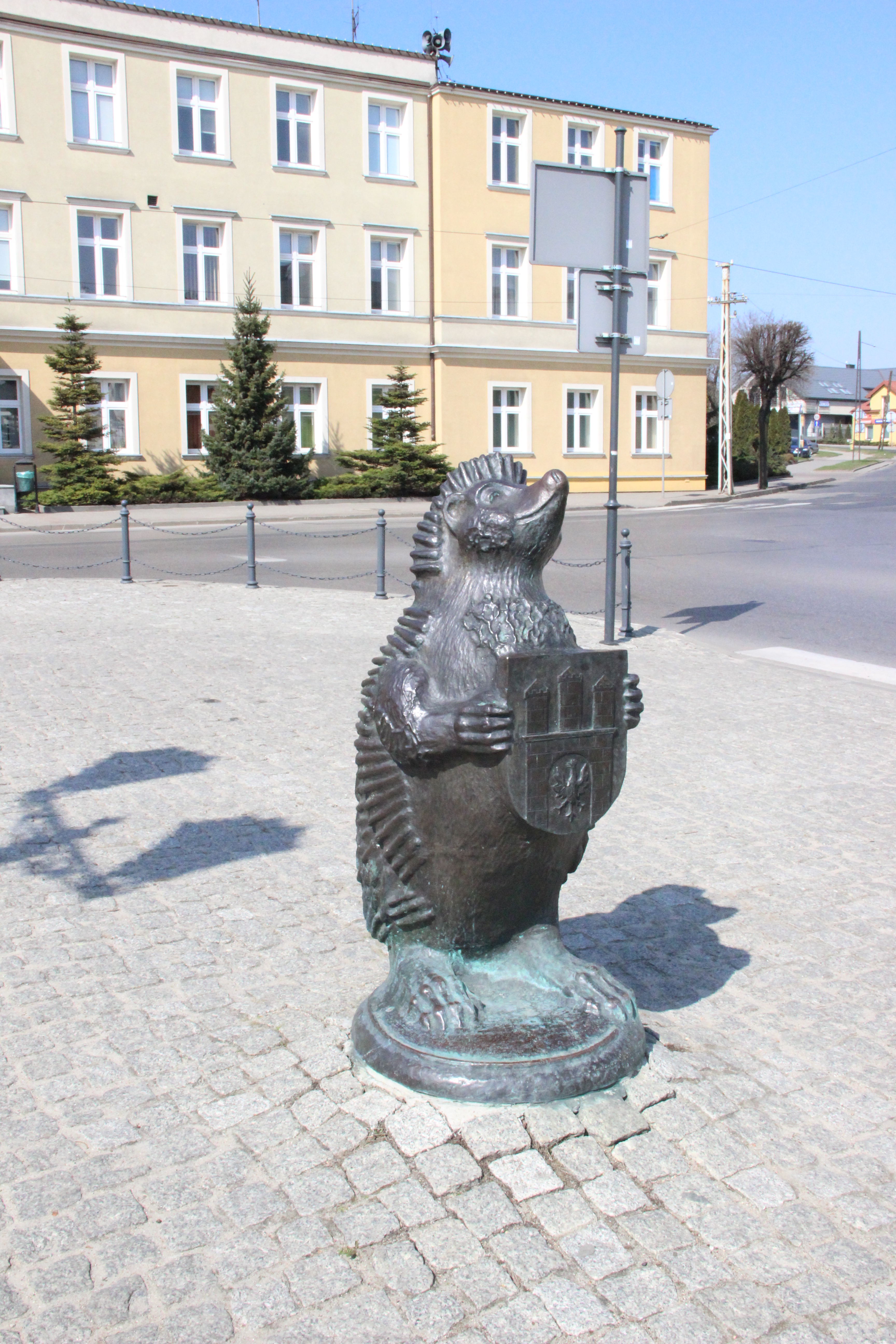 Pomnik Jeża ze Zgierza